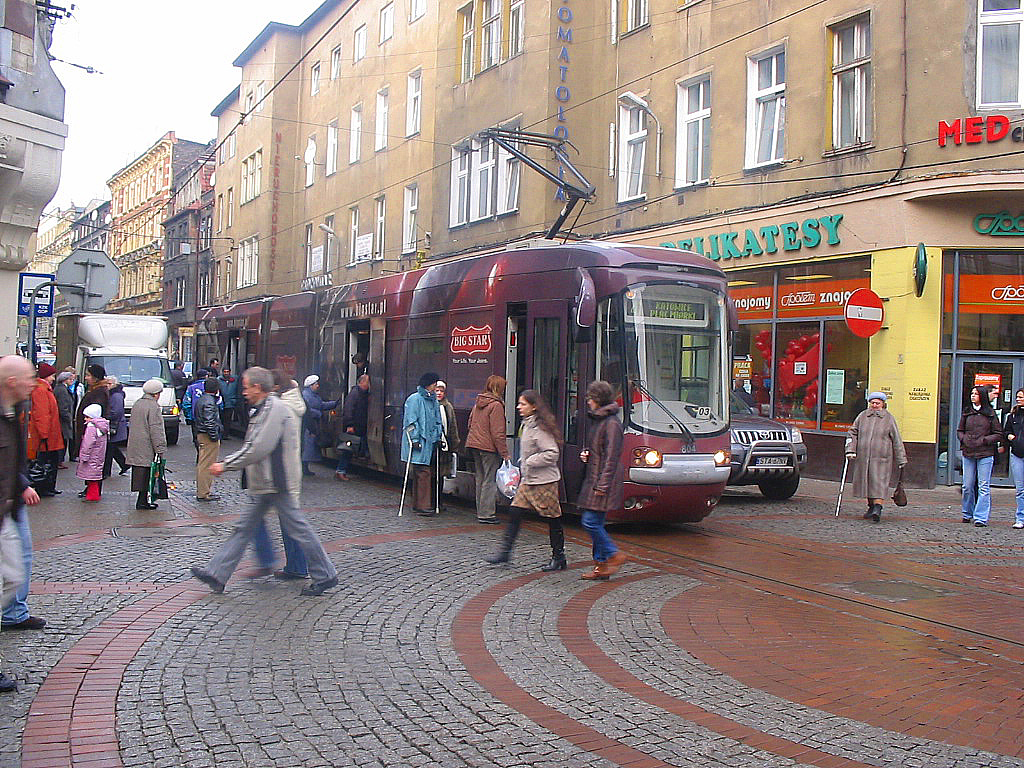 Tramwaj Konstal 116Nd Karlik w Bytomiu.